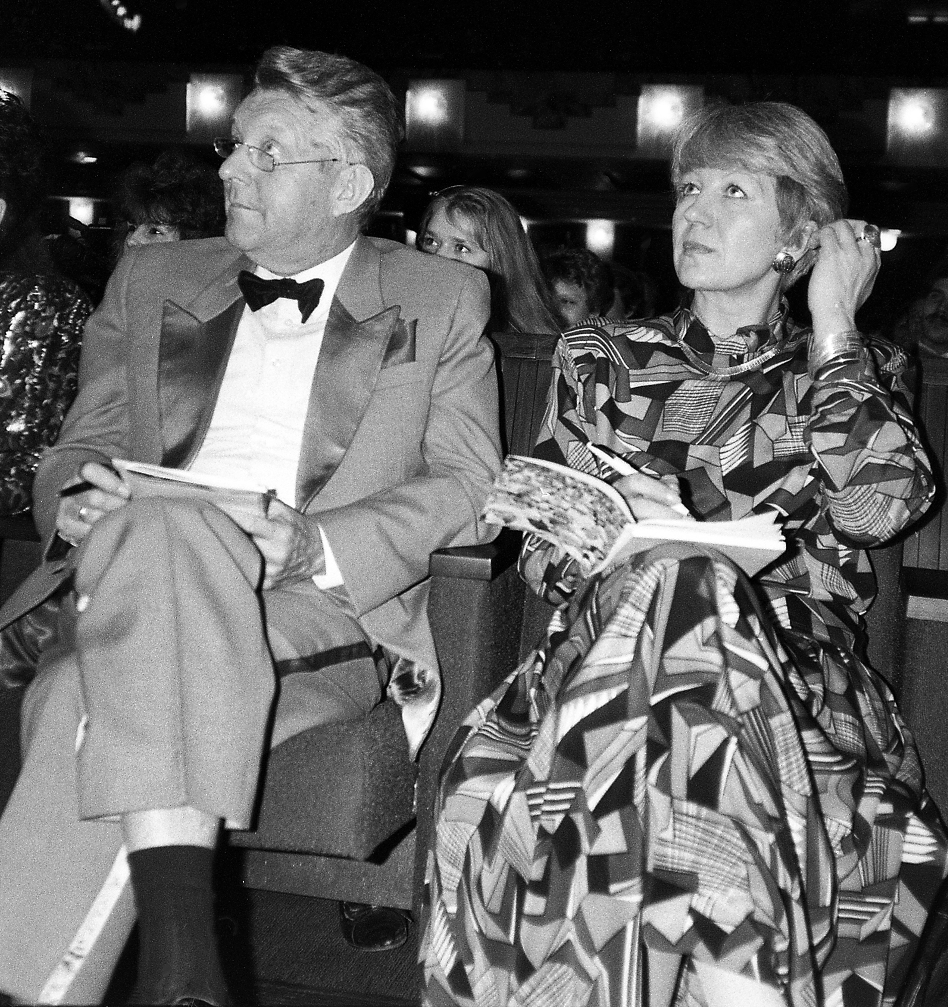 Oleg Sapožnin ja moekunstnik Krista Kajandu Miss Miss Estonia 88 žüriis